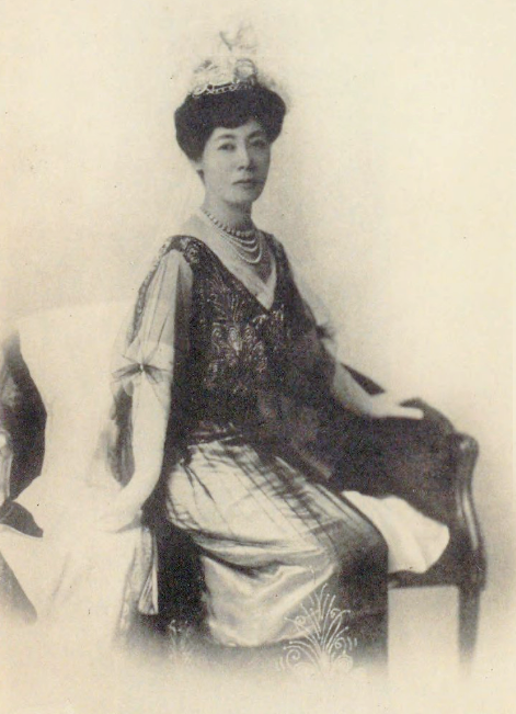 井上勝之助の妻末子